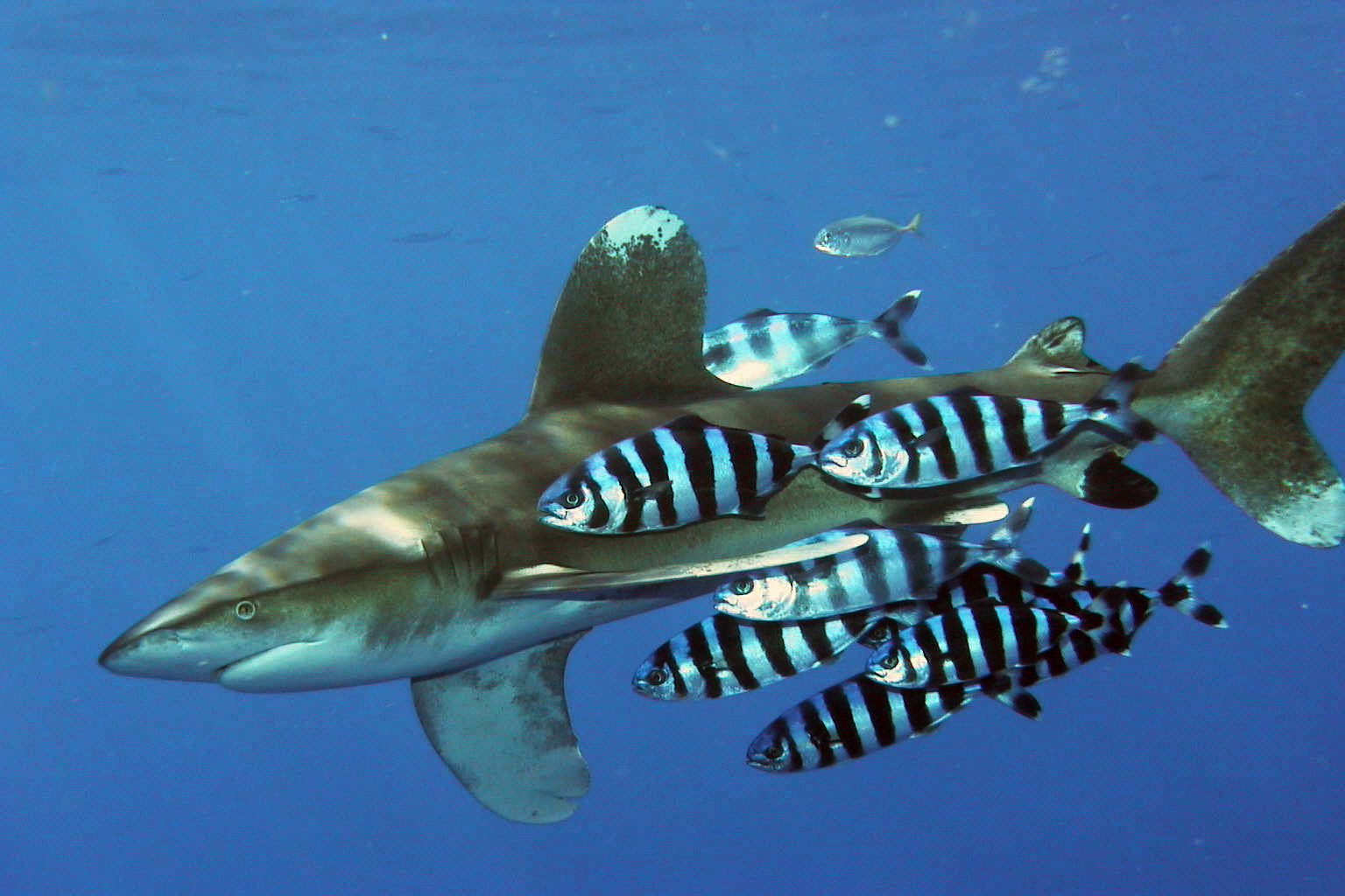 Carcharhinus longimanus, ca. 2.50m lang, Tiefe ca. 2-3m, mit Pilotbarschen (Naucrates ductor). Fotografiert am 09.06.2002 am Elphinstoneriff / Rotes Meer / Ägypten Das Fotos wurde von mir selbst erstellt und ist im Originalzustand (also nicht bearbeitet) Weitere Fotos unter